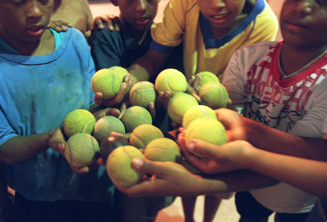 09/09/2004 - Meninos de rua fazem malabarismo usando bolinhas, no sinal em frente ao posto Mengão, na Lagoa. Foto de Andréa Farias